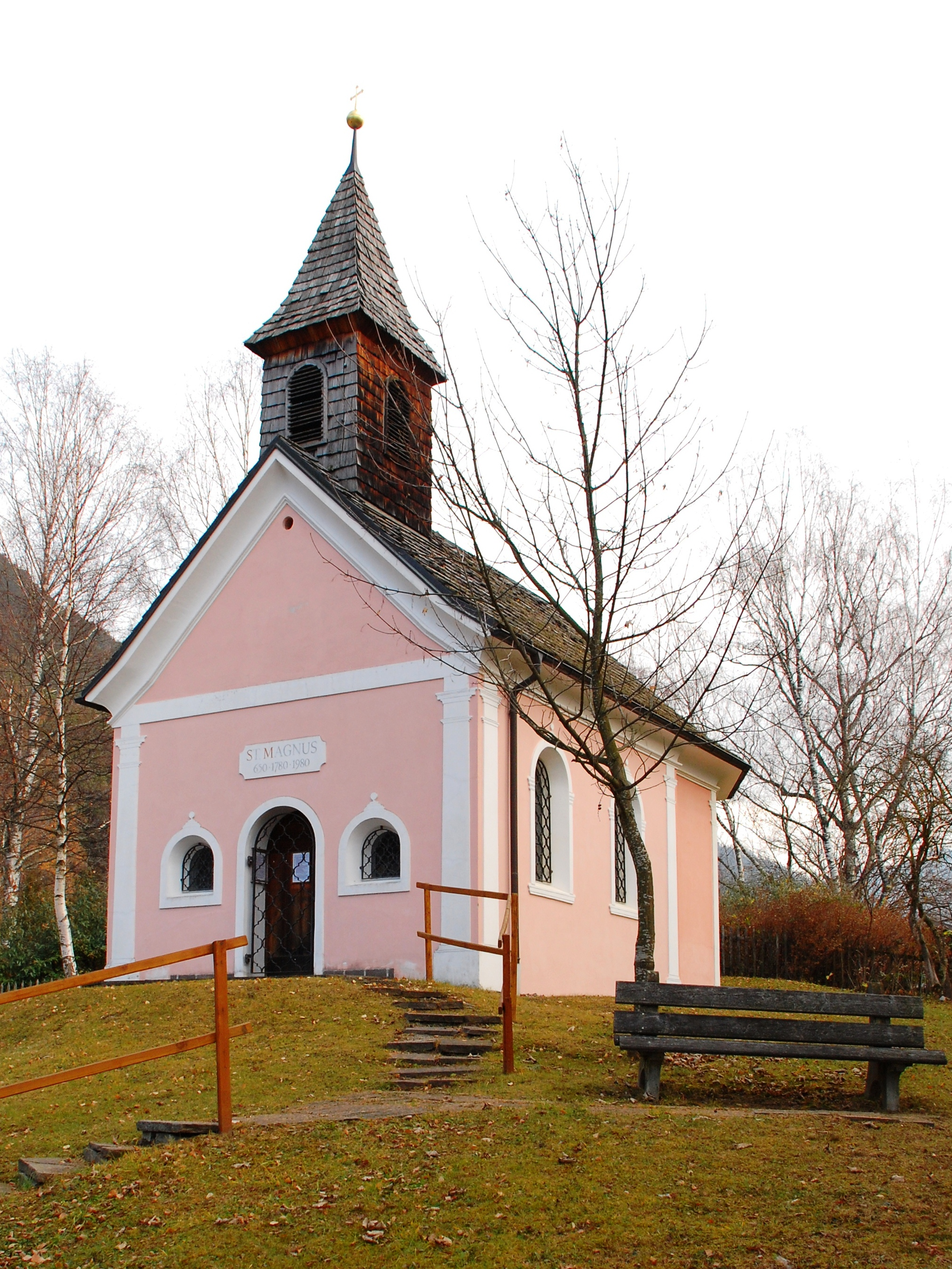 Kapelle St. Magnus in Leithen, Gemeinde Reith bei Seefeld, Bezirk Innsbruck Land, Tirol, Österreich. Laut Gebäudetafel Neubau von 1980 in den Formen einer 1780 erbauten Barockkapelle.